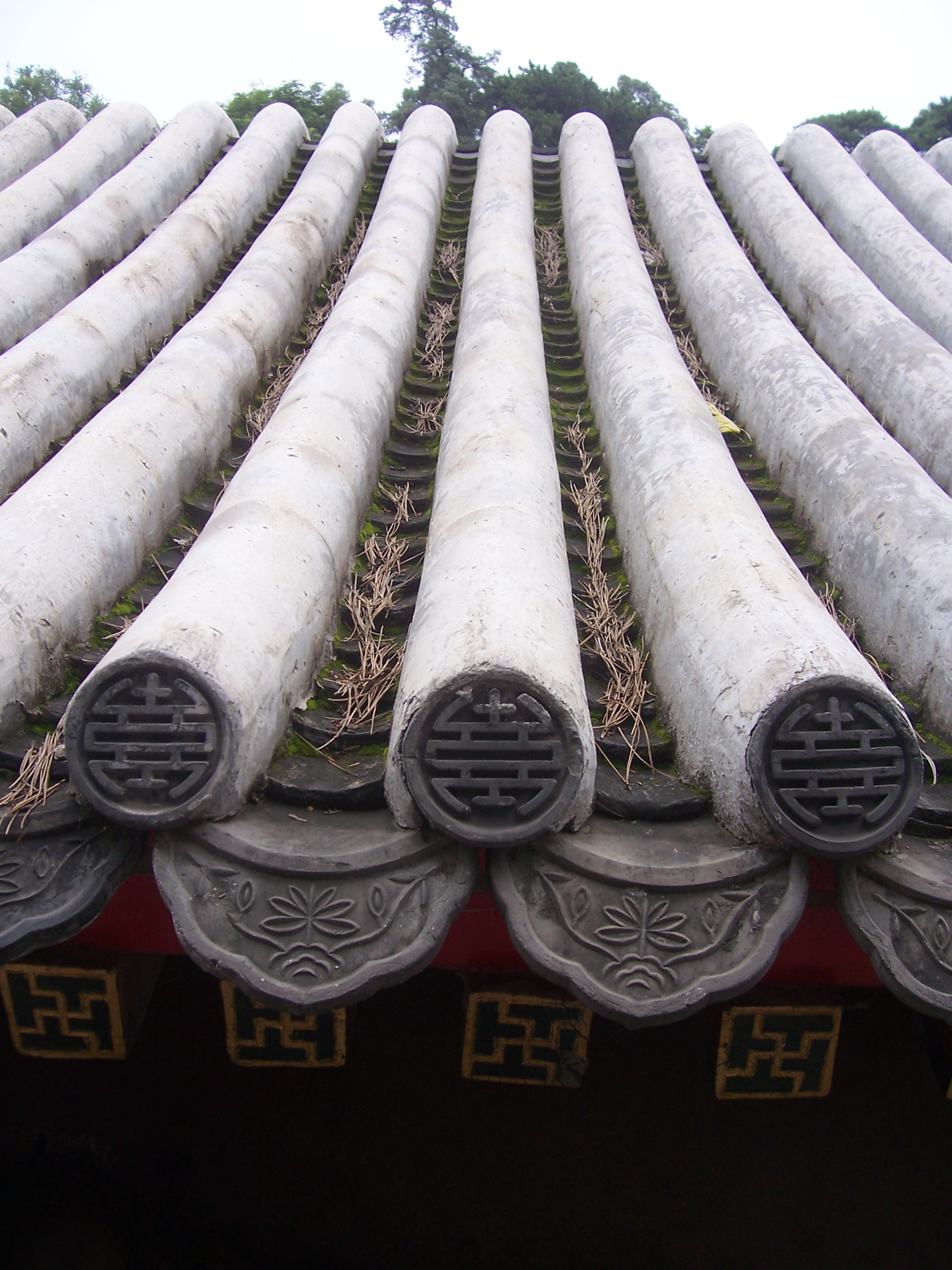 Détail d'un toit en tuile du palais d'été (Beijing).